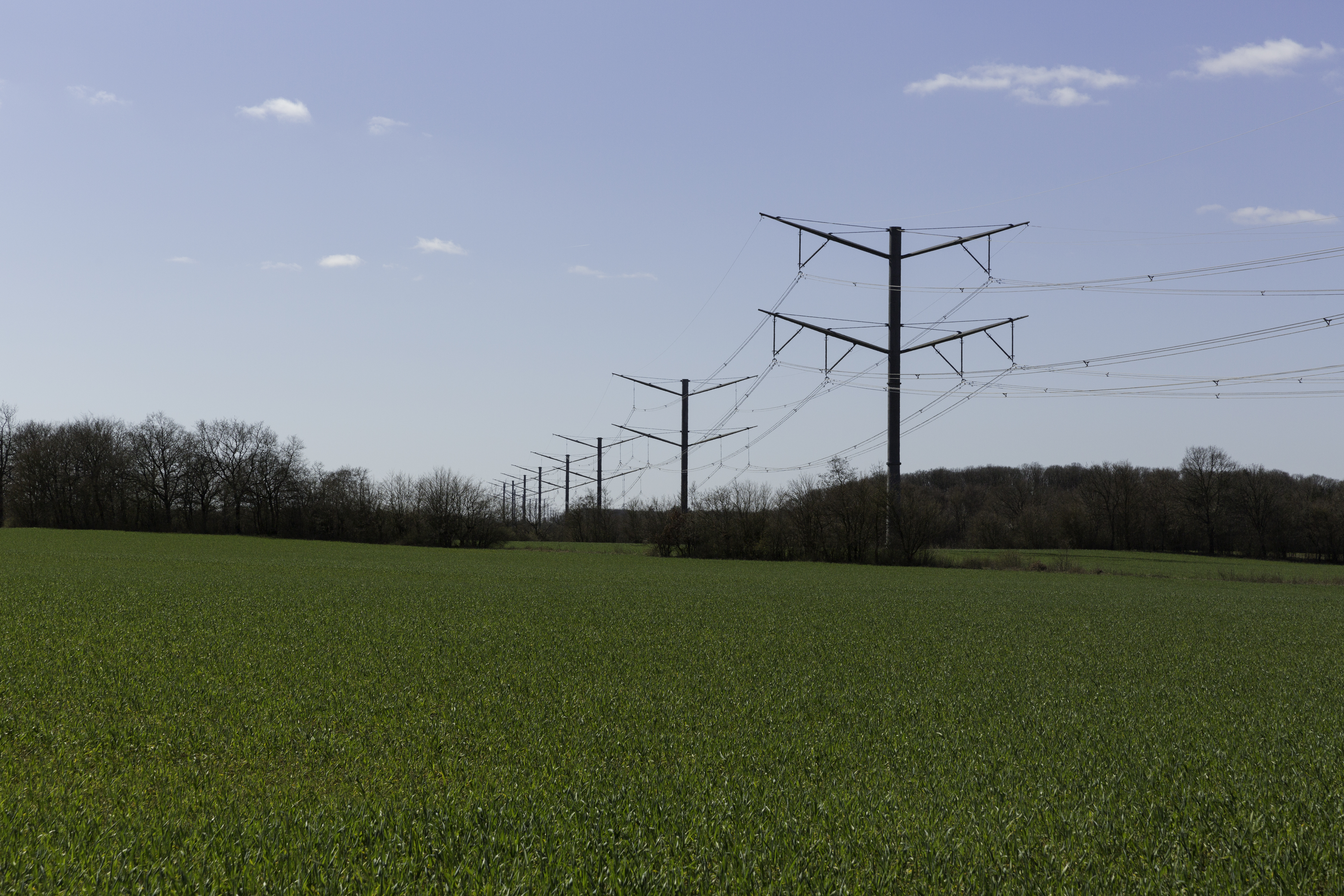 Højspændingsforbindelsen Kassø–Tjele: Sidste mast før overgangsstationen der leder energien gennem jordkabler på sydvestsiden af Bølling Sø ved Engesvang